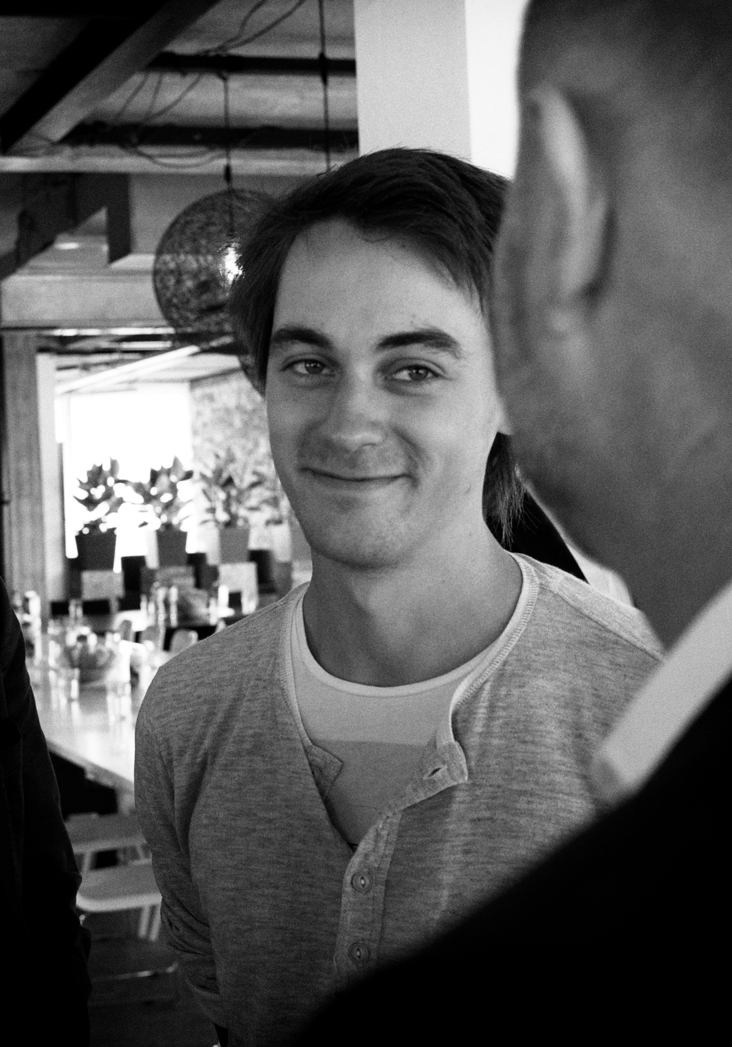 Alexander Klöpping